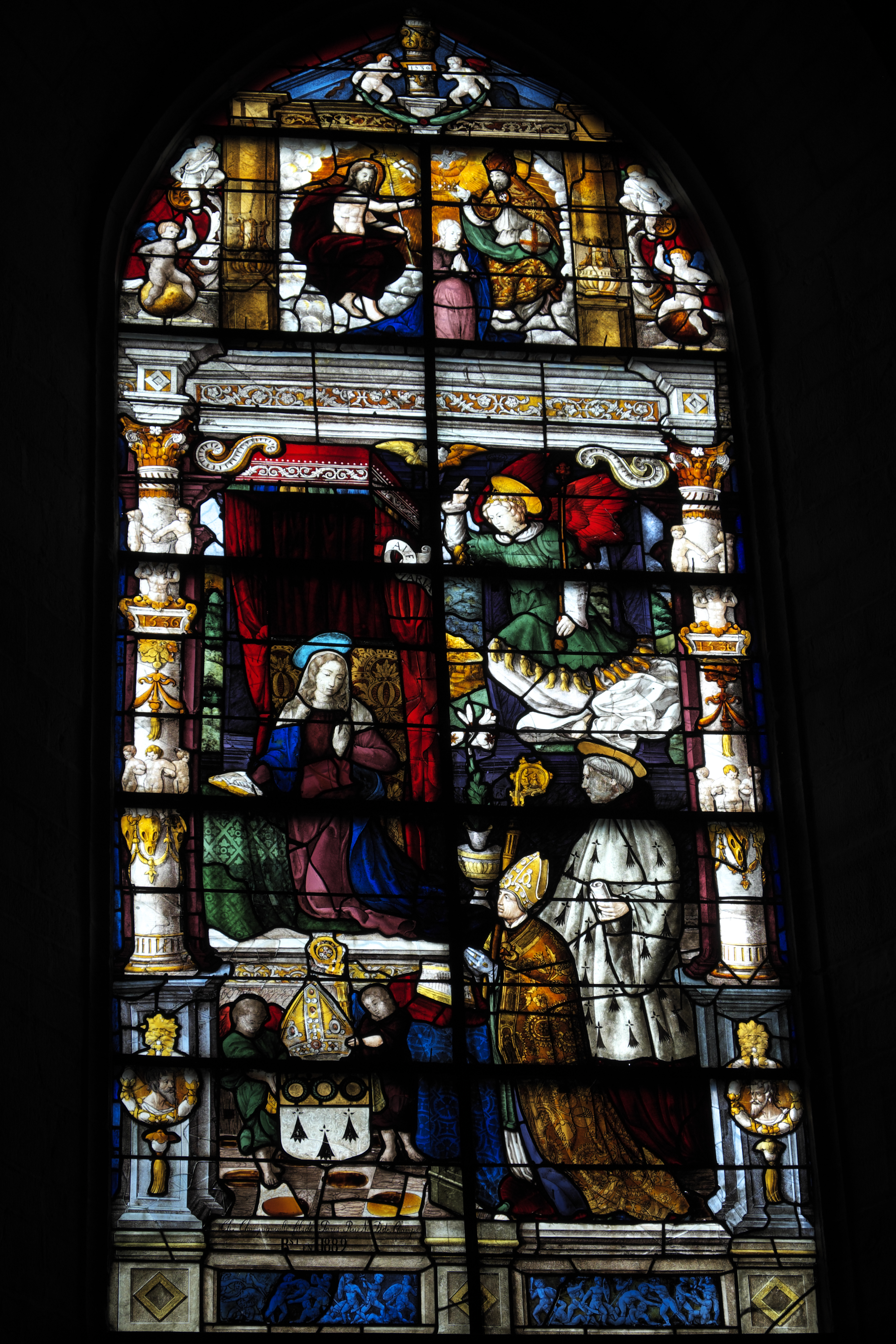 Basilika Notre-Dame-de-l'Assomption in La Guerche-de-Bretagne im Département Ille-et-Vilaine (Bretagne/Frankreich), Bleiglasfenster (Baie 08) mit der Jahreszahl 1536, restauriert 1889, Signatur: Ch. Champigneulle fils de Paris Rue N. Dame des Champs; Darstellung: Verkündigung (Mitte), Marienkrönung (oben)